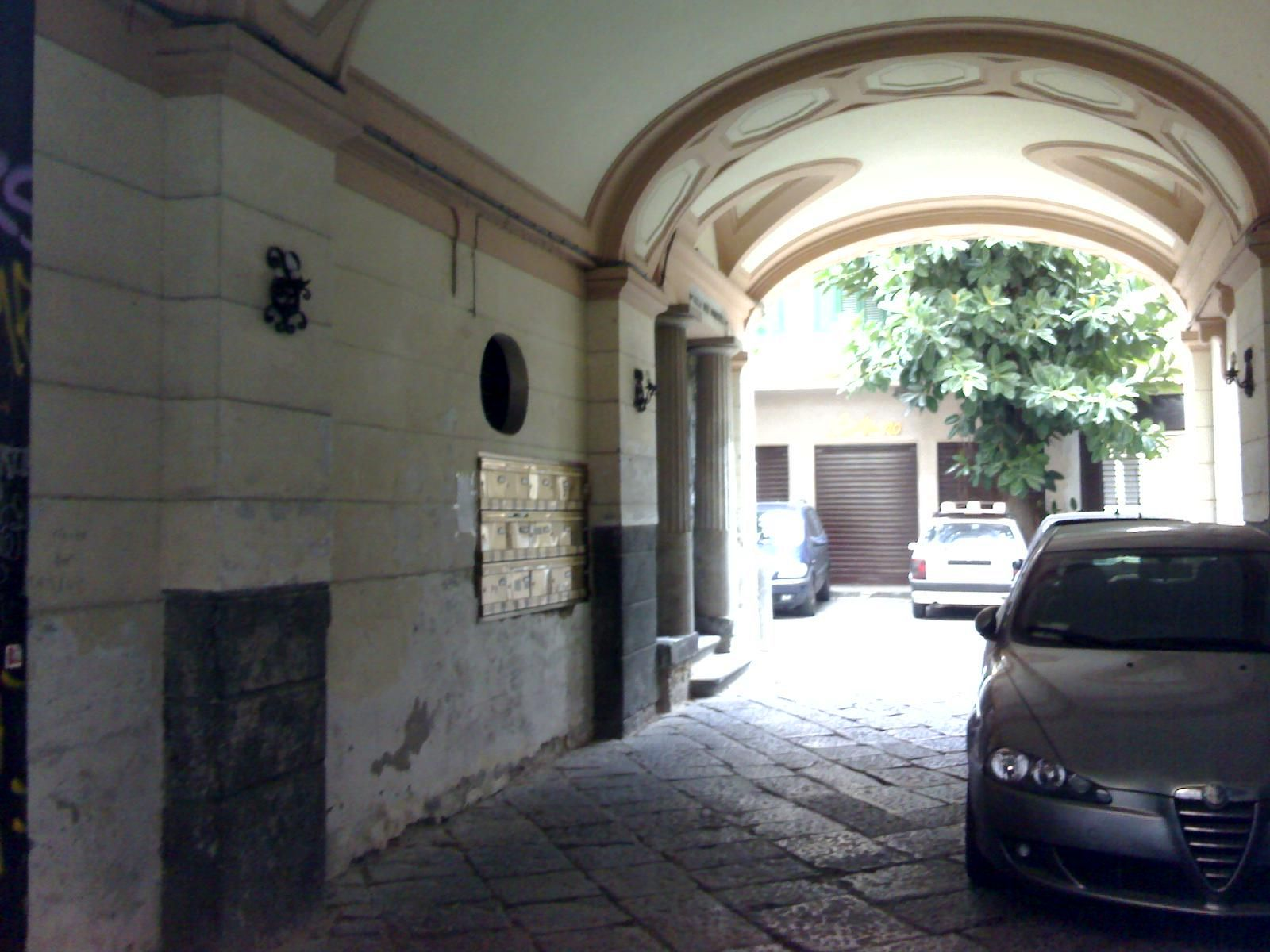 Palazzo Mazziotti (Napoli) - Vista verso il cortile interno. Sulla sinistra si vedono le colonne neoclassiche.